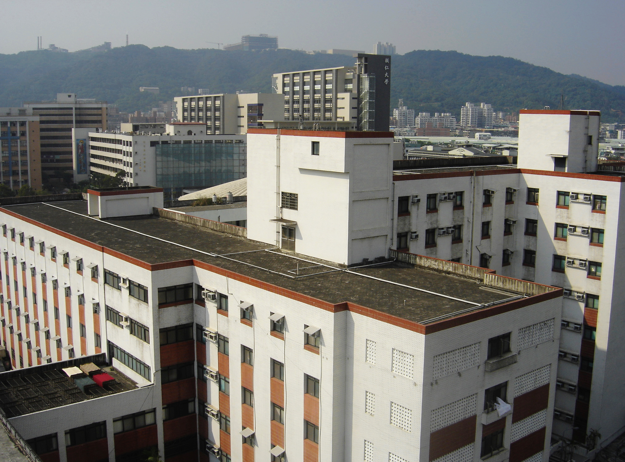 輔大文舍宿舍